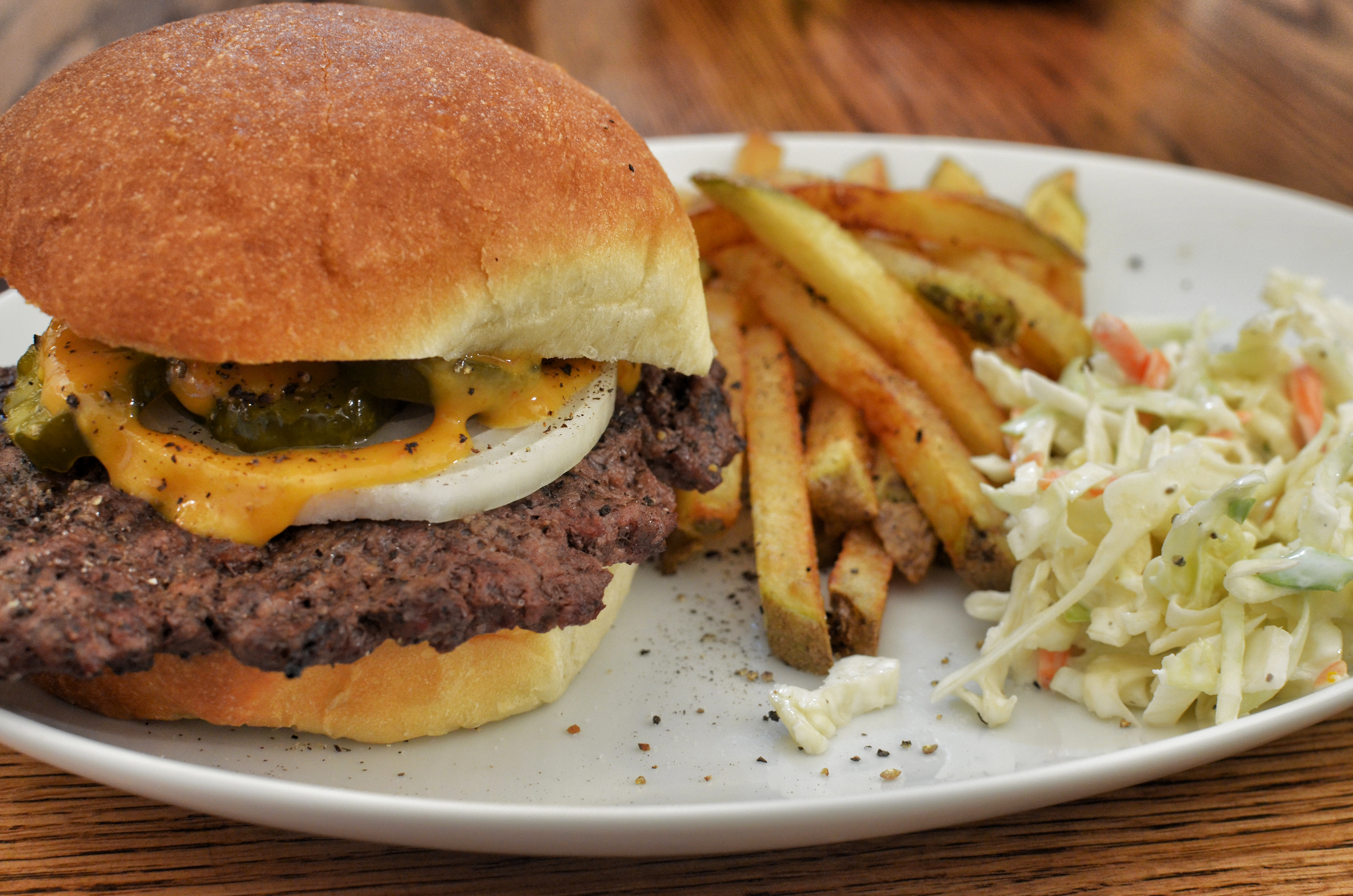 Mmm... cheeseburger